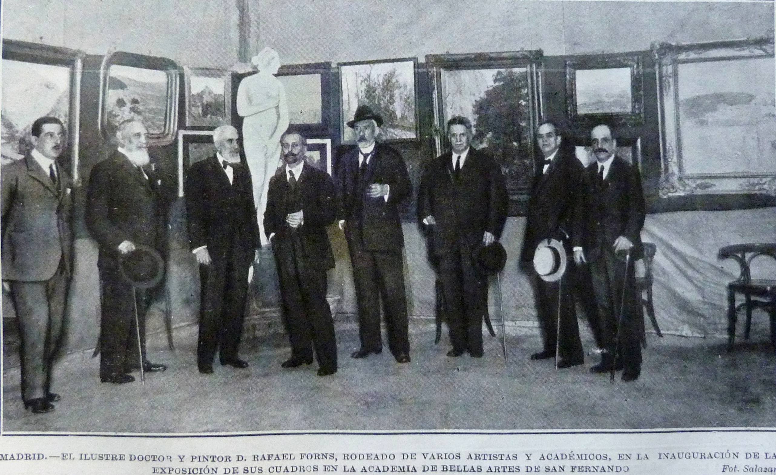 Rafael Forns (cuarto desde la izquierda) rodeado de artistas y académicos en la inauguración de su exposici´ñon en la Real Academia de Bellas Artes de San Fernando. El primero de la izquierda es Francisco Pérez Dolz; el número cinco, al lado de Forns, el pintor y gran amigo suyo Cecilio Plá.